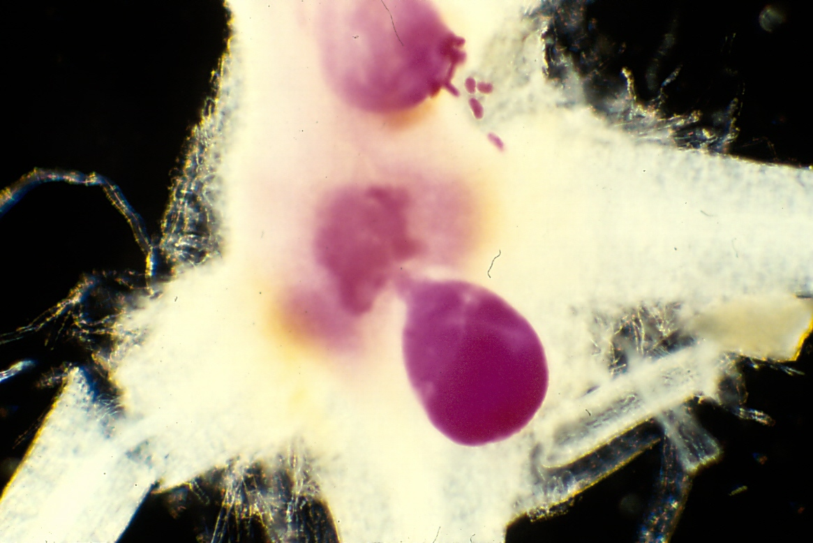 Meloidogyne arenaria (adult females) in Arachis hypogaea